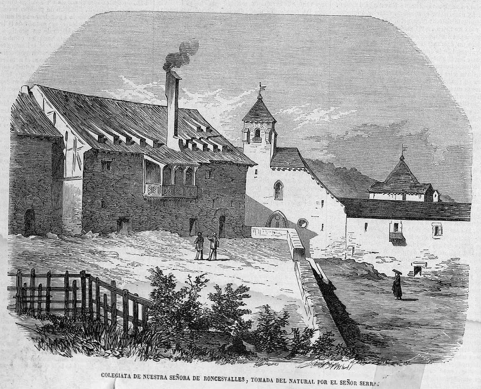 Colegiata de Nuestra Señora de Roncesvalles, en la revista española El Museo Universal.